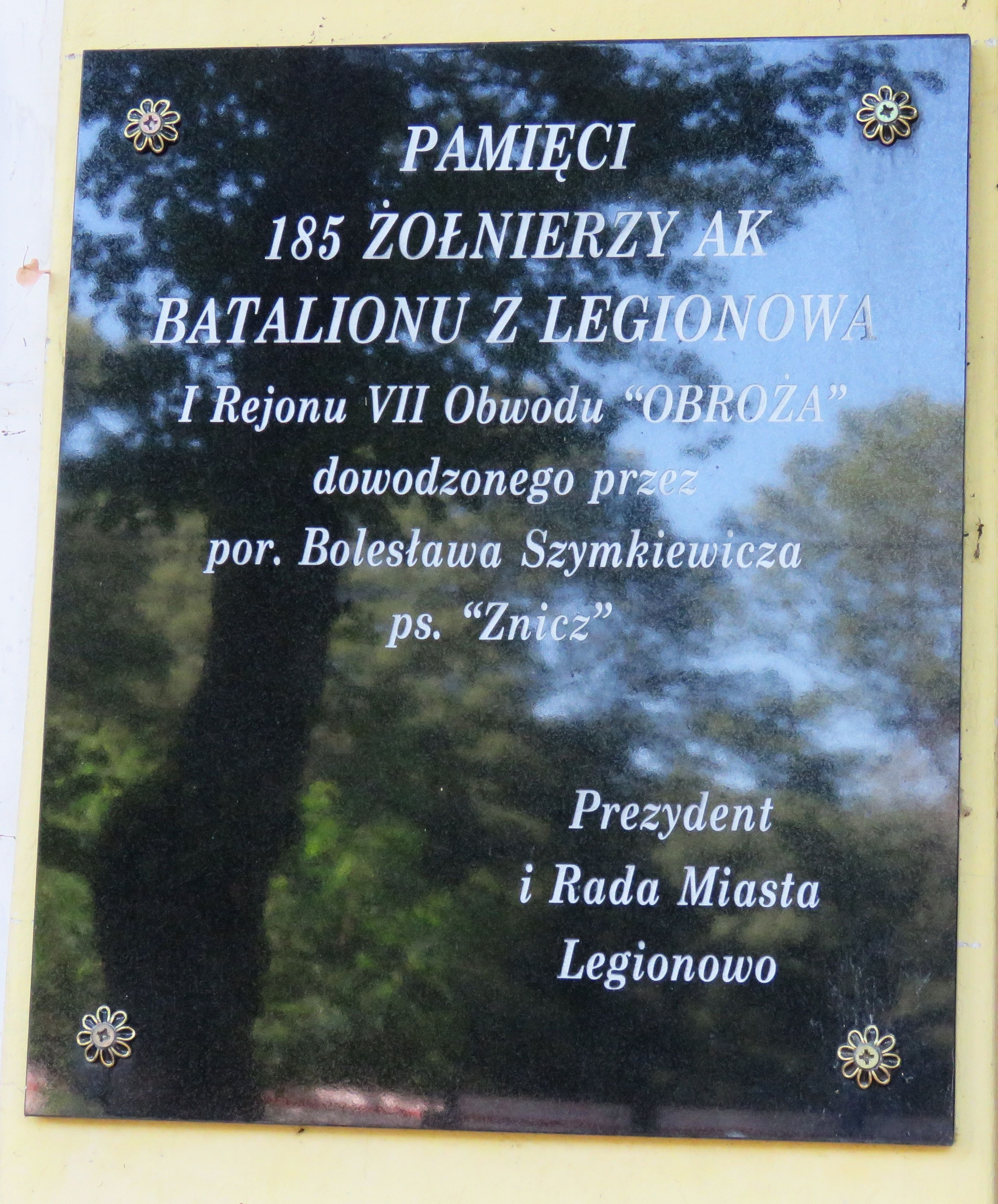 WIERSZE Kościół p.w. Św. Maksymiliana Marii Kolbe TABLICA NA KOŚCIELE 15